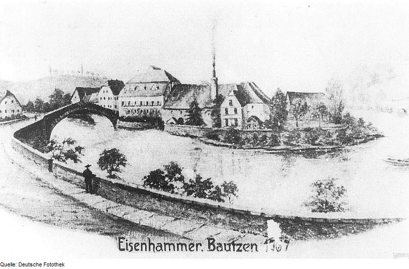 Original image description from the Deutsche Fotothek Bautzen. Eisenhammer 1767, aus: Bautzener Kulturschau, Juli 1981